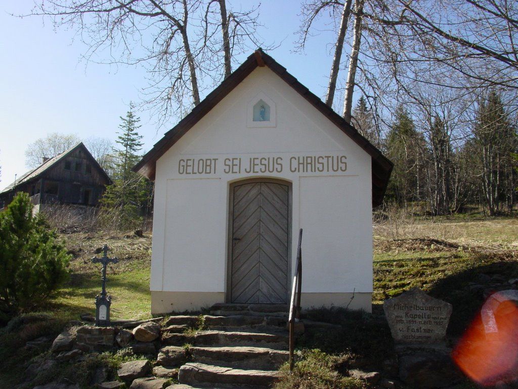 Bučina - Kaplička sv. Michala